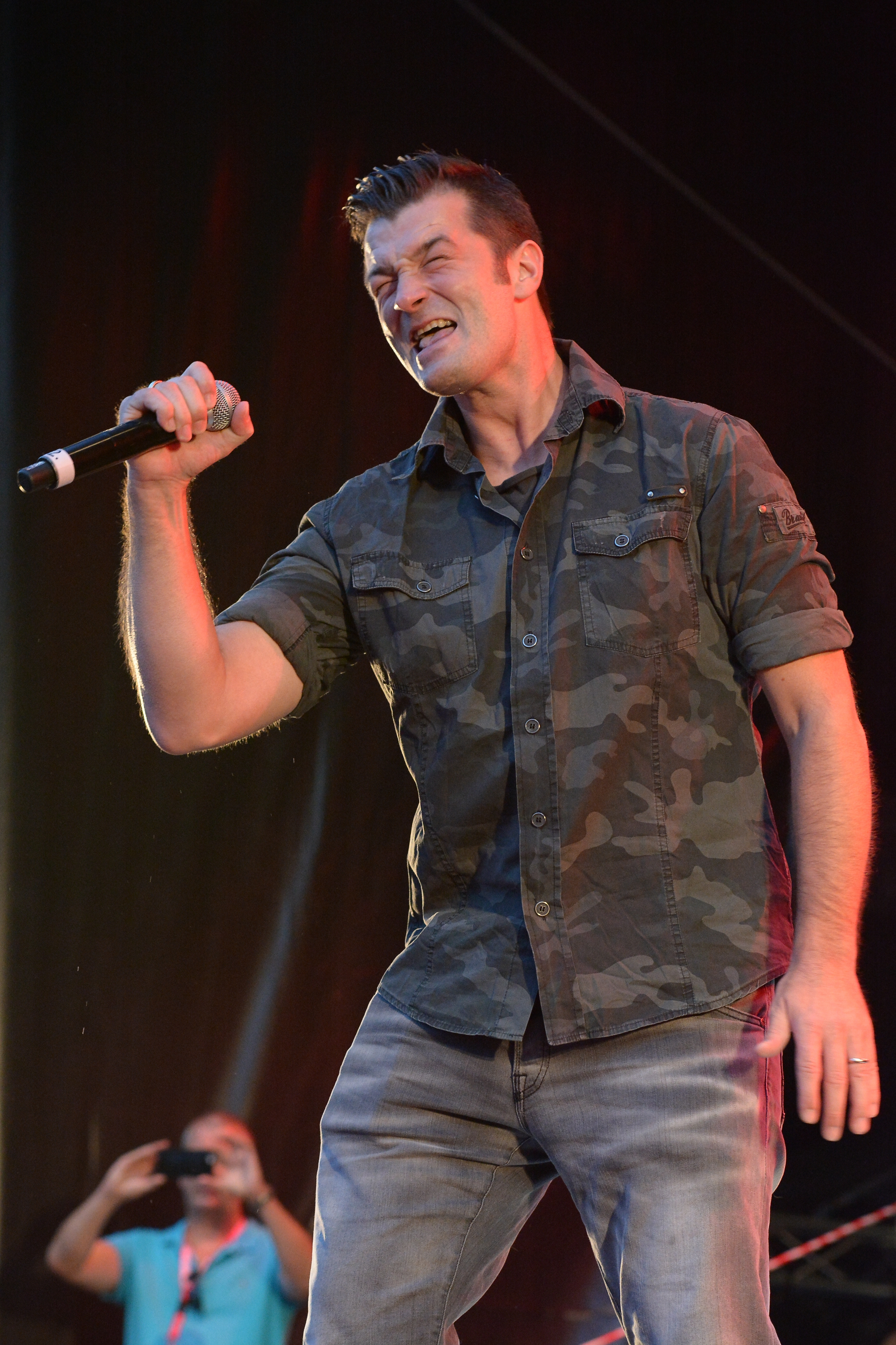 Achim Petry bei Essen.Original. 2015